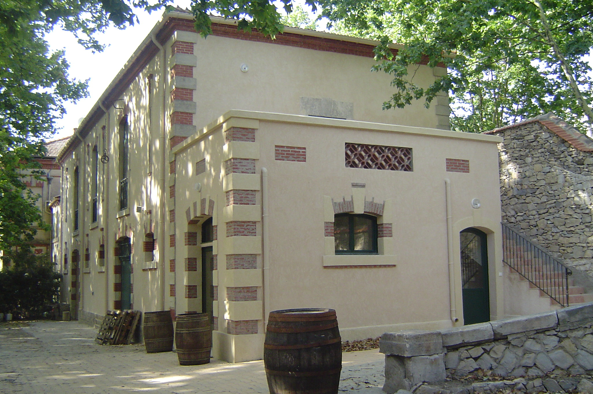 Cave du Château Langlade, dans le Gard. Photo personnelle de Nicolas Cadène, reproduction sur Wikipedia autorisée, à l'identique.